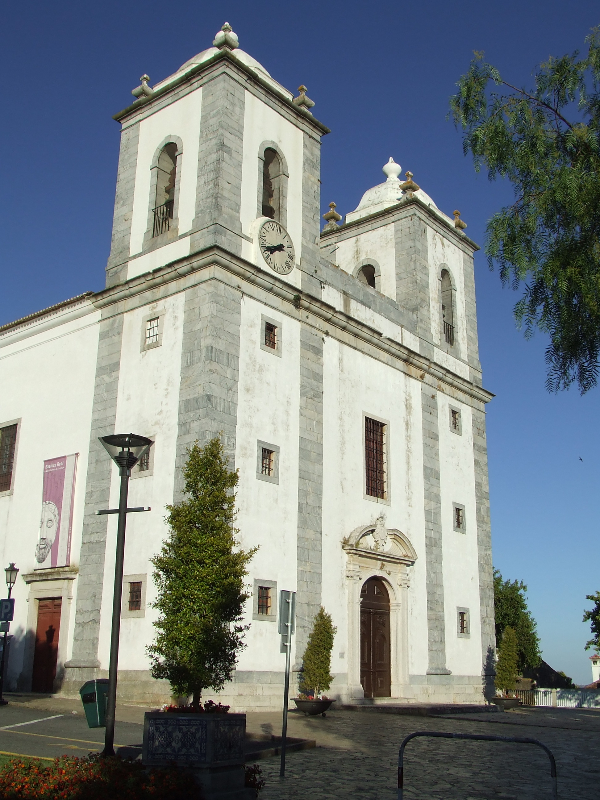 Royal Basilica of Castro Verde- Alentejo - Portugal